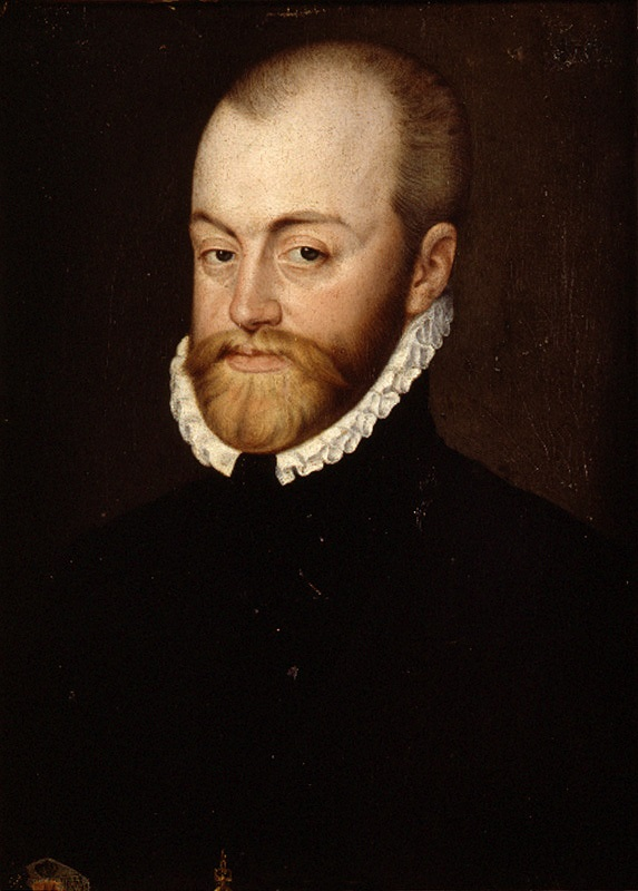 Retrato del rey Felipe II de España (1527-1598), que fue hijo del emperador Carlos I de España y de la emperatriz Isabel de Portugal.